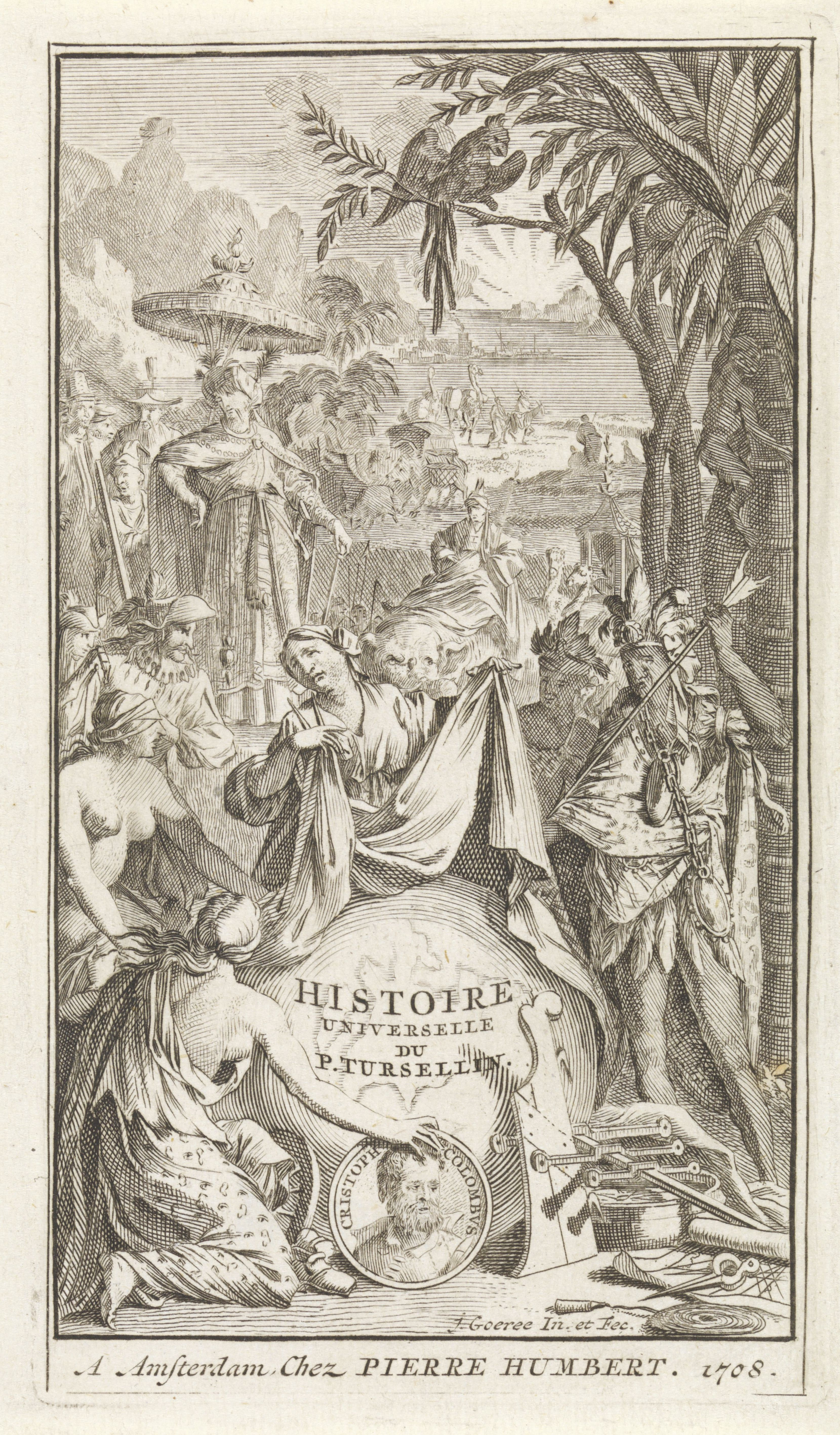 IdentificatieTitel(s): Geschiedenis onthult de wereldTitelpagina voor Orazio Torsellino, Histoire universelle, 1708Histoire universelle (titel op object)Objecttype: prent titelpagina Objectnummer: RP-P-OB-52.856Omschrijving: In het midden een wereldbol met de titel van het boekwerk. De personificatie Geschiedenis staat achter de wereldbol en onthult deze. Op de voorgrond houdt Faam, gekleed in een gewaad bedrukt met ogen, het portret van Christoffel Columbus vast. Op de achtergrond de volkeren uit de hele wereld.VervaardigingVervaardiger: prentmaker: Jan Goeree (vermeld op object)naar ontwerp van: Jan Goeree (vermeld op object)uitgever: Pierre Humbert (vermeld op object)Plaats vervaardiging: AmsterdamDatering: 1708Fysieke kenmerken: gravureMateriaal: papier Techniek: graveren (drukprocedé)Afmetingen: plaatrand: b 80 mm × h 138 mmToelichtingTitelpagina voor Orazio Torsellino, Histoire universelle, Amsterdam bij Pierre Humbert, 1708.OnderwerpWat: 'Historia'; 'Historia' (Ripa)Fame; 'Fama', 'Fama buona', 'Fama chiara' (Ripa)globeAfricansNative peoples of the AmericasAsiatic races and peoples: PersiansAsiatic races and peoples: TurksWie: Christoffel ColumbusVerwerving en rechtenVerwerving: onbekendCopyright: Publiek domein